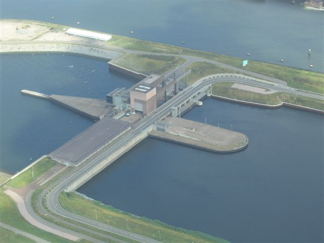 Bron van de foto is onbekend. Eigendom van Rijkswaterstaat Noord-Holland ten behoeve van illustratie in nota's, folders e.d.